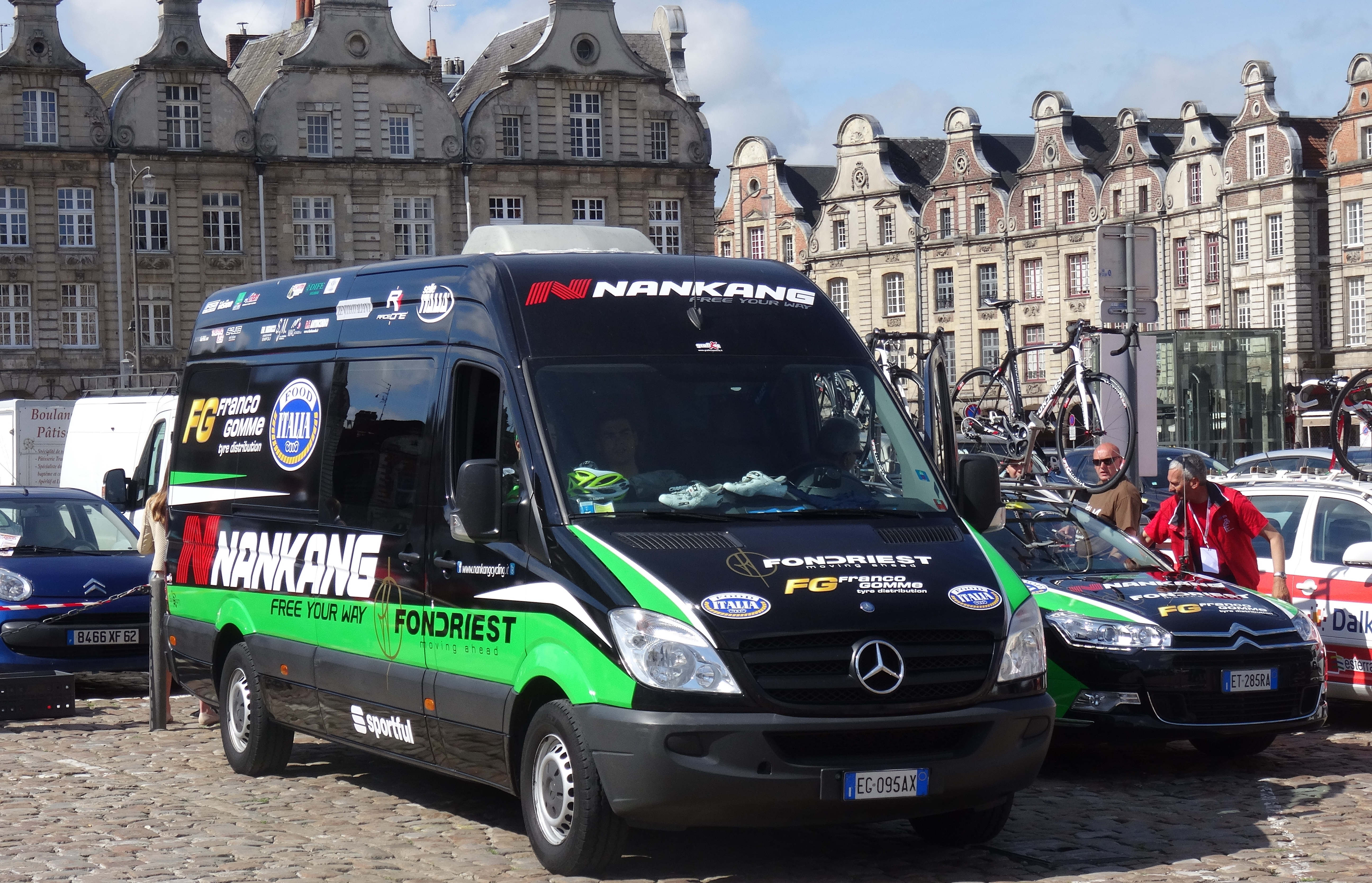 Reportage photographique réalisé le dimanche 25 mai 2014 à l'occasion du départ et de l'arrivée de la troisième étape du Paris-Arras Tour 2014 à Arras, Pas-de-Calais, Nord-Pas-de-Calais, France.